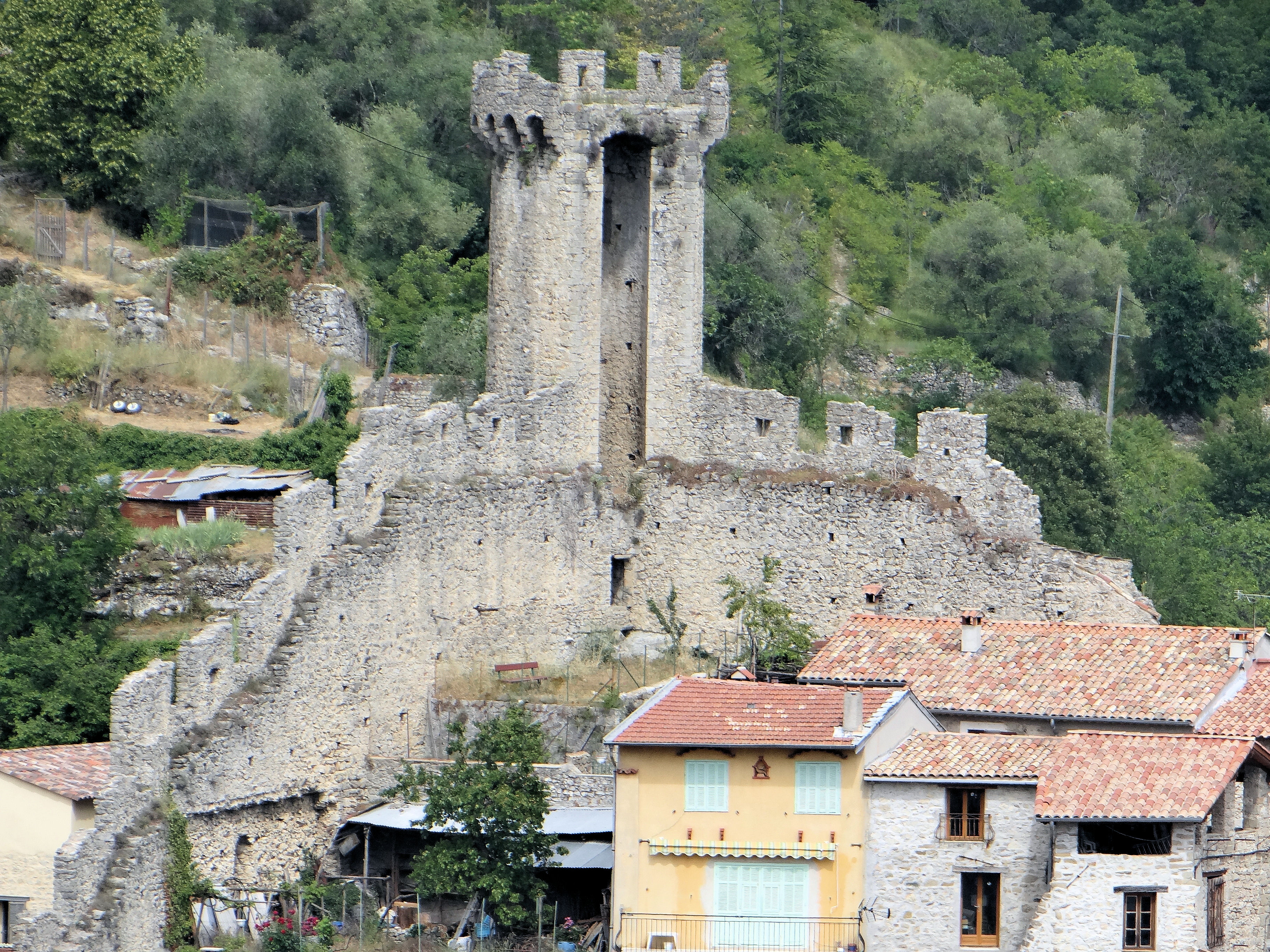 Enceinte de Lucéram - Tour et mur d'enceinte au nord-est